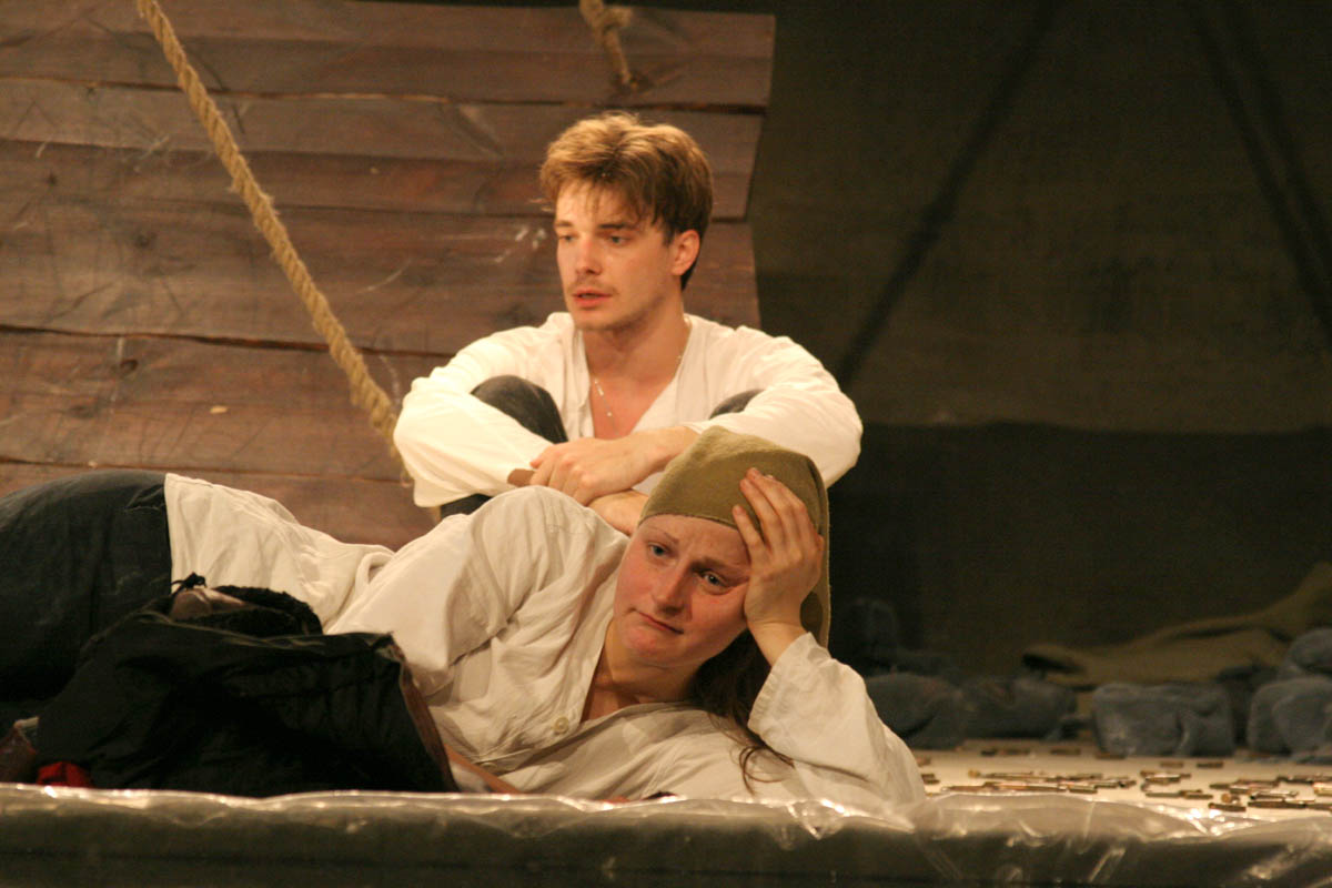 Cцена из спектакля «Сорок первый. OPUS POST». Яна Сексте и Максим Матвеев